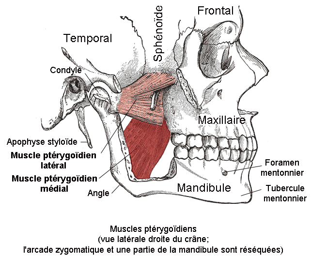 Muscle_ptérygoïdien_médial. Anatomie humaine